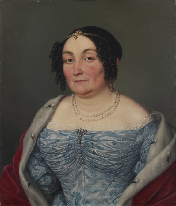 Halbfigur nahezu en face mit gemustertem, dekolletiertem Seidenkleid und einem Umhang mit Hermelinbesatz. Sie trägt in ihrem hochgesteckten, seitlich gelockten Haar ein schmales Diadem, dazu passenden Ohrschmuck und eine Brosche am Ausschnitt. Ihren Hals schmückt eine doppelreihige Perlenkette. Gertrude Falkenstein (1803-1882) war die Gemahlin Kurfürst Friedrich Wilhelms I.